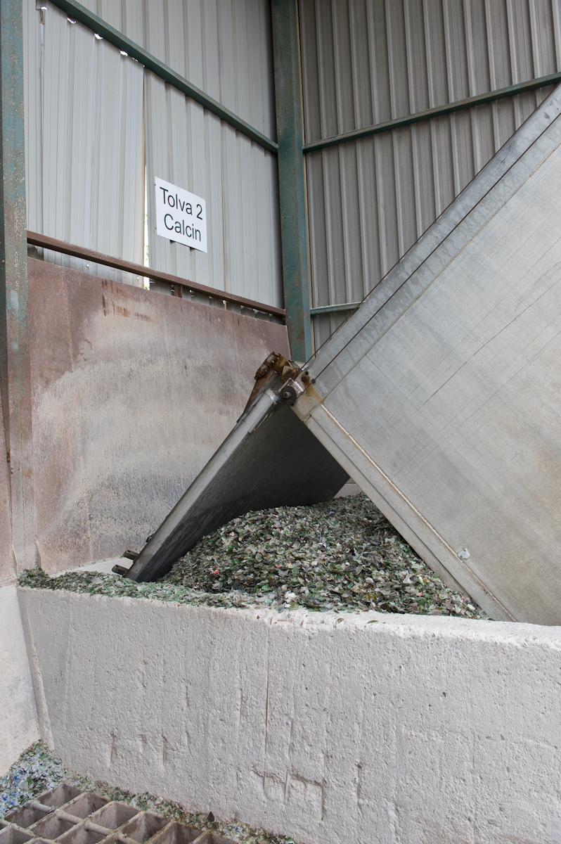 El calcín clasificado por color llega a su tolva correspondiente